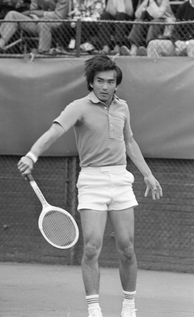 Kwartfinales tennistoernooi Melkhuisje, Kamiwazumi (Japan) in actie